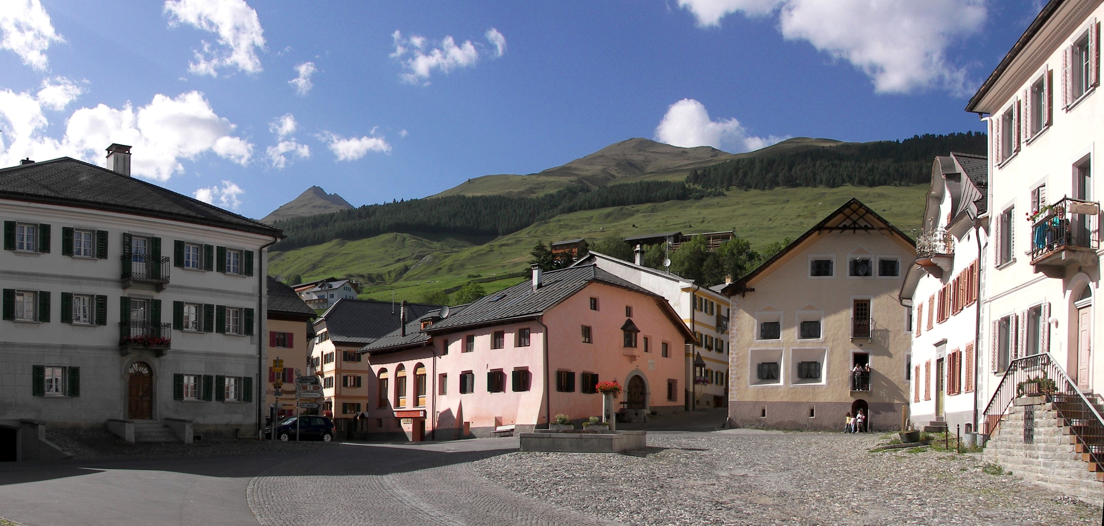 Hauptplatz von Sent im Engadin, Graubünden